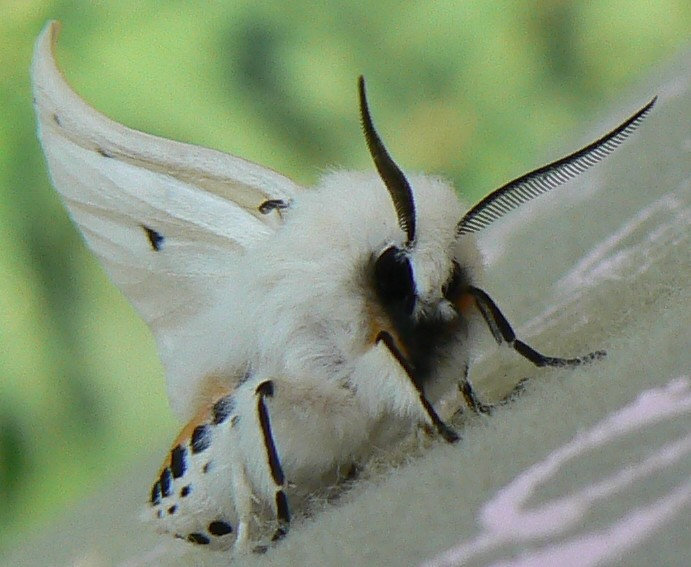 Spilosoma lubricipeda/white ermine/écaille tigrée/witte tijgervlinder/weisser Tigerbär